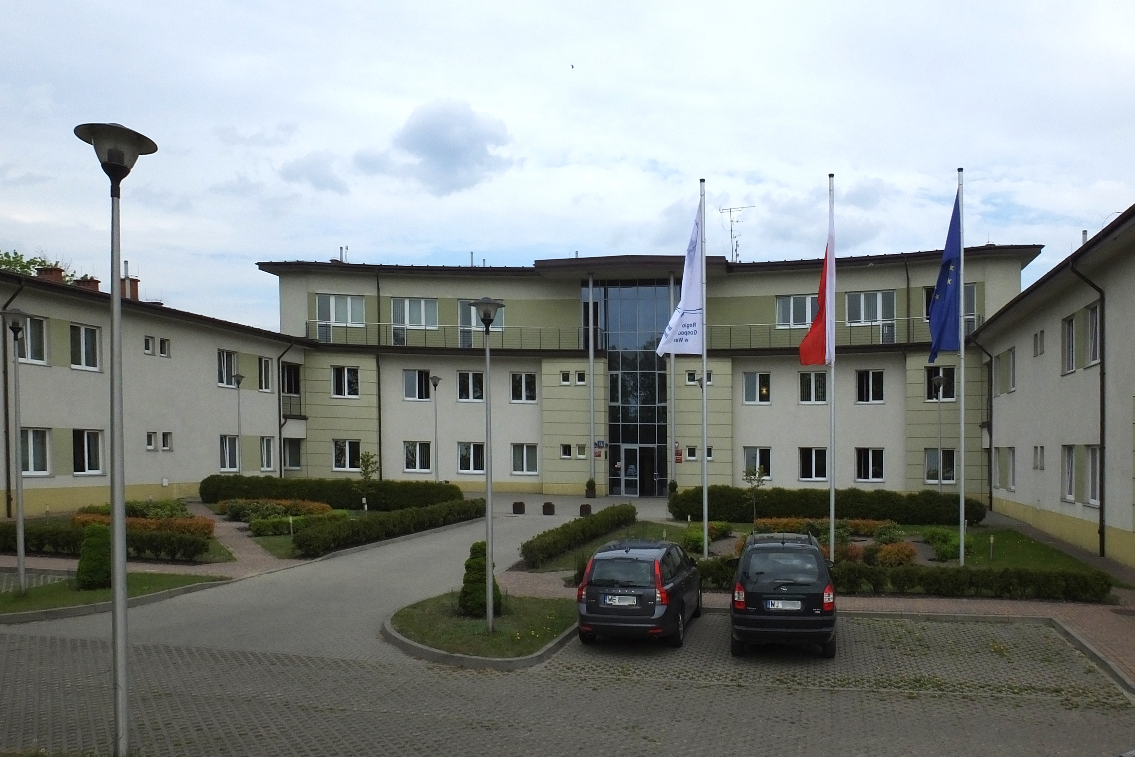 Siedziba Regionalnego Zarządu Gospodarki Wodnej w Warszawie, ul. Zarzecze 13b